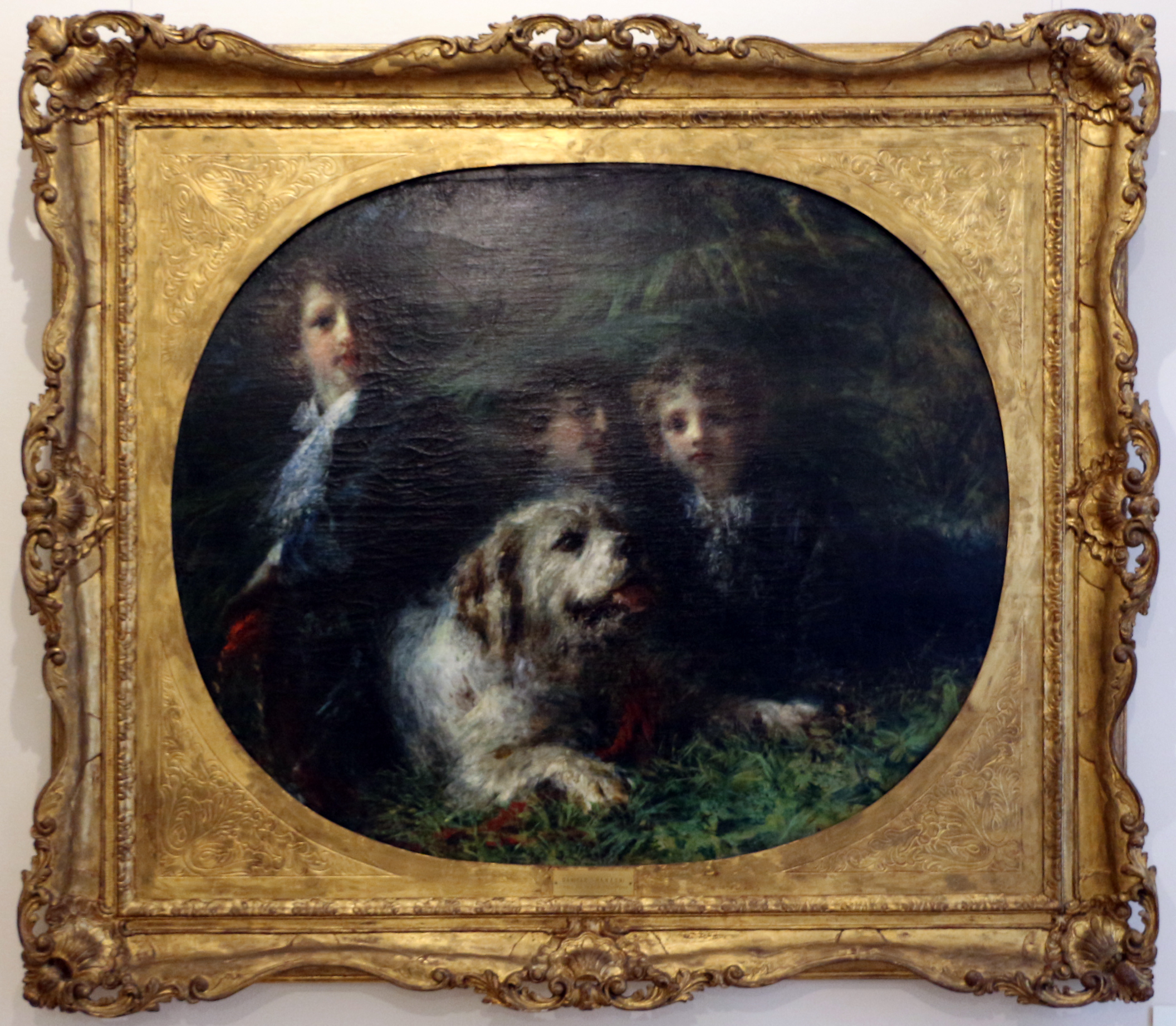 Villa Reale di Milano This is a photo of a monument which is part of cultural heritage of Italy.